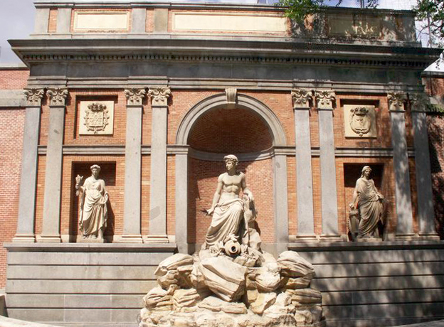 Vistafrontal de la Fuente del Lozoya (1858) de Madrid (España). Conjunto escultórico del primer depósito del Canal de Isabel II. Calle de Bravo Murillo 49. Ingeniero Juan de Ribera Piferrer construido en 1858.